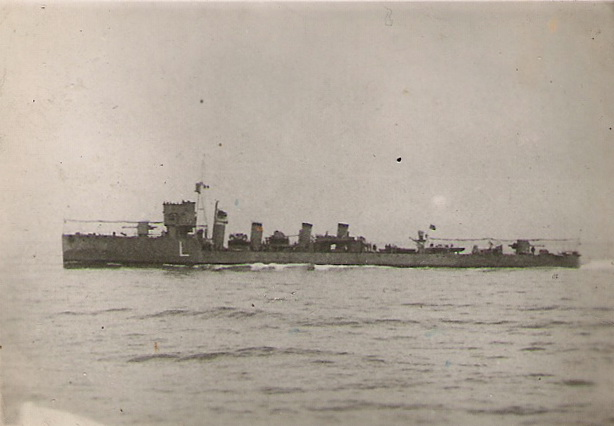 Destructor Lazaga, de la Armada Española